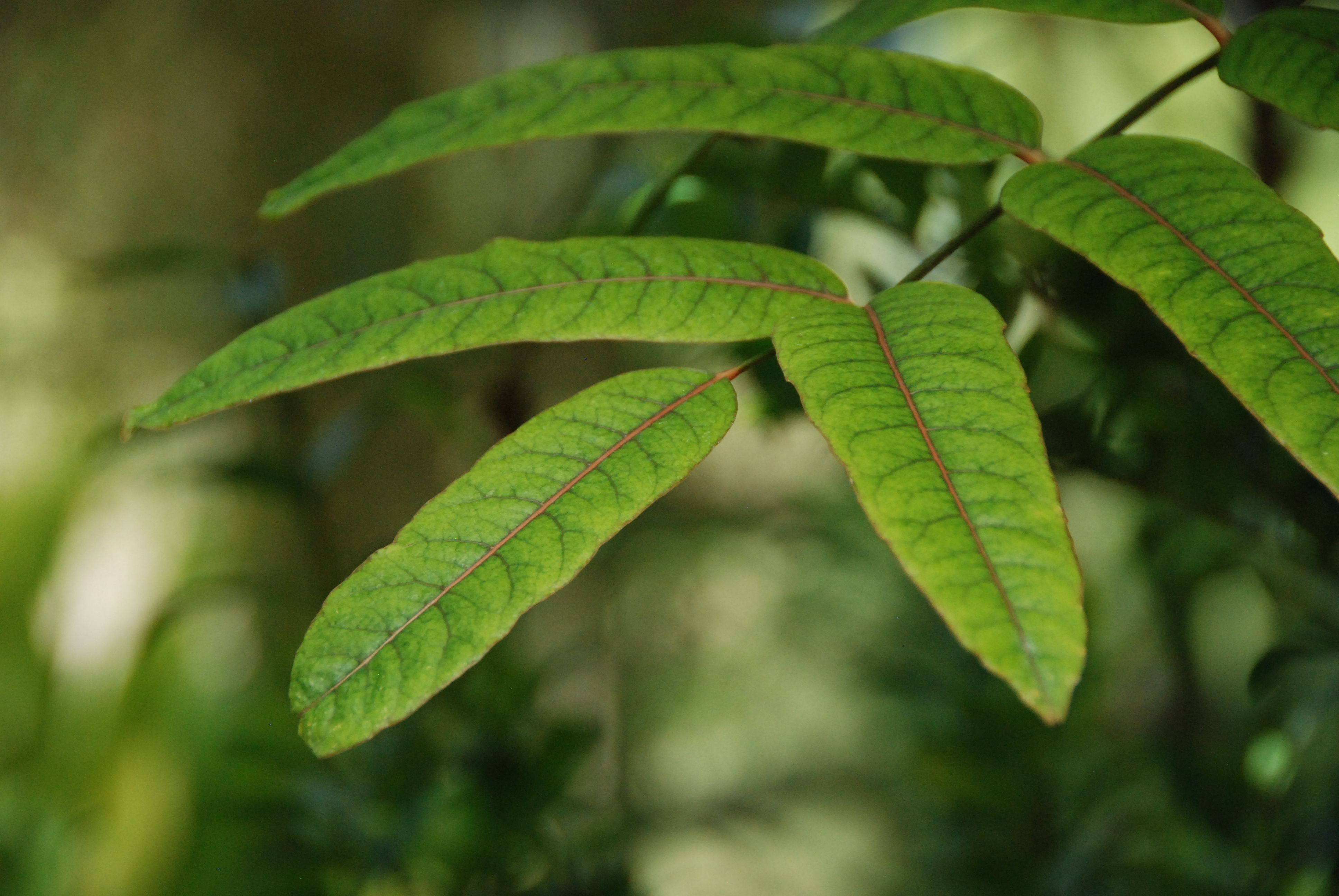 User:Philweb Polyscias aemiliguineae, photo prise au Conservatoire national de botanique de Brest à l'occasion du "Wiki takes Conservatoire Botanique National de Brest"